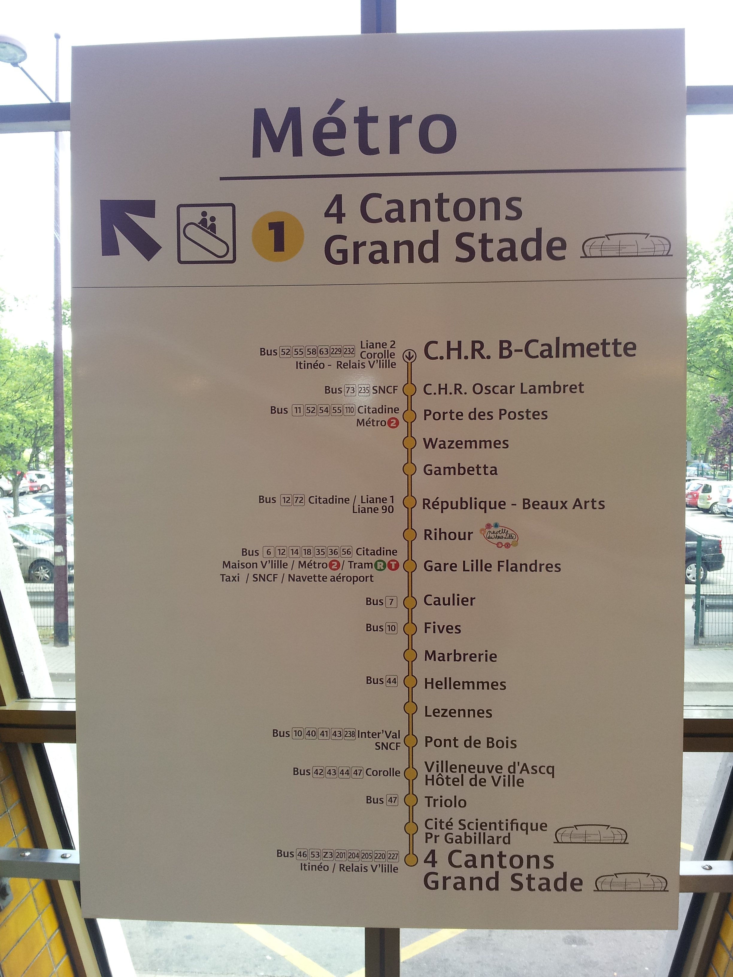 Liste des arrets de la ligne 1 du métro de Lille , panneaux situés avant chaque accés au quai